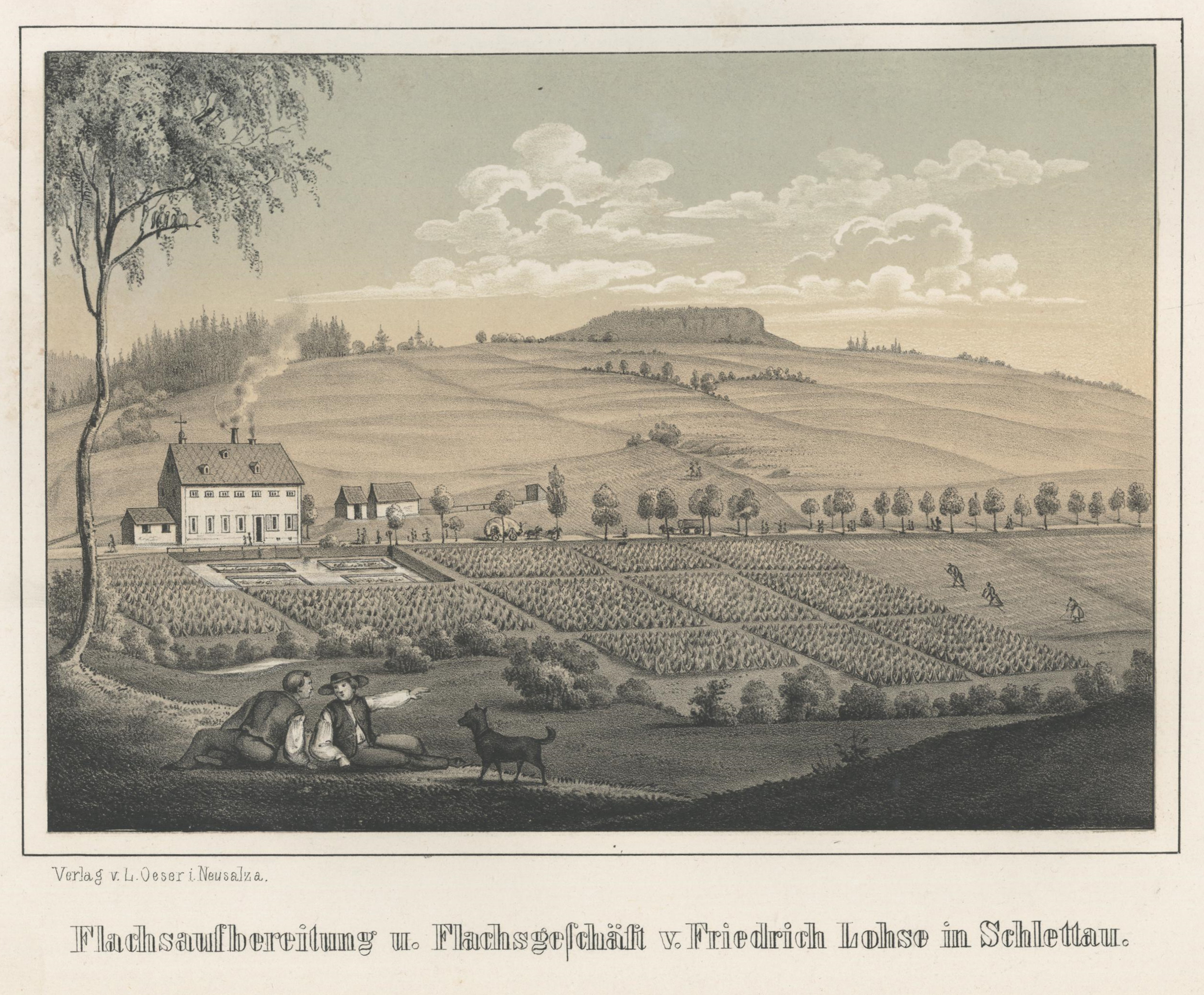 Flachsaufbereitung und Flachsgeschäft von Friedrich Lohse in Schlettau aus: Album der Sächsischen Industrie Zweiter Band